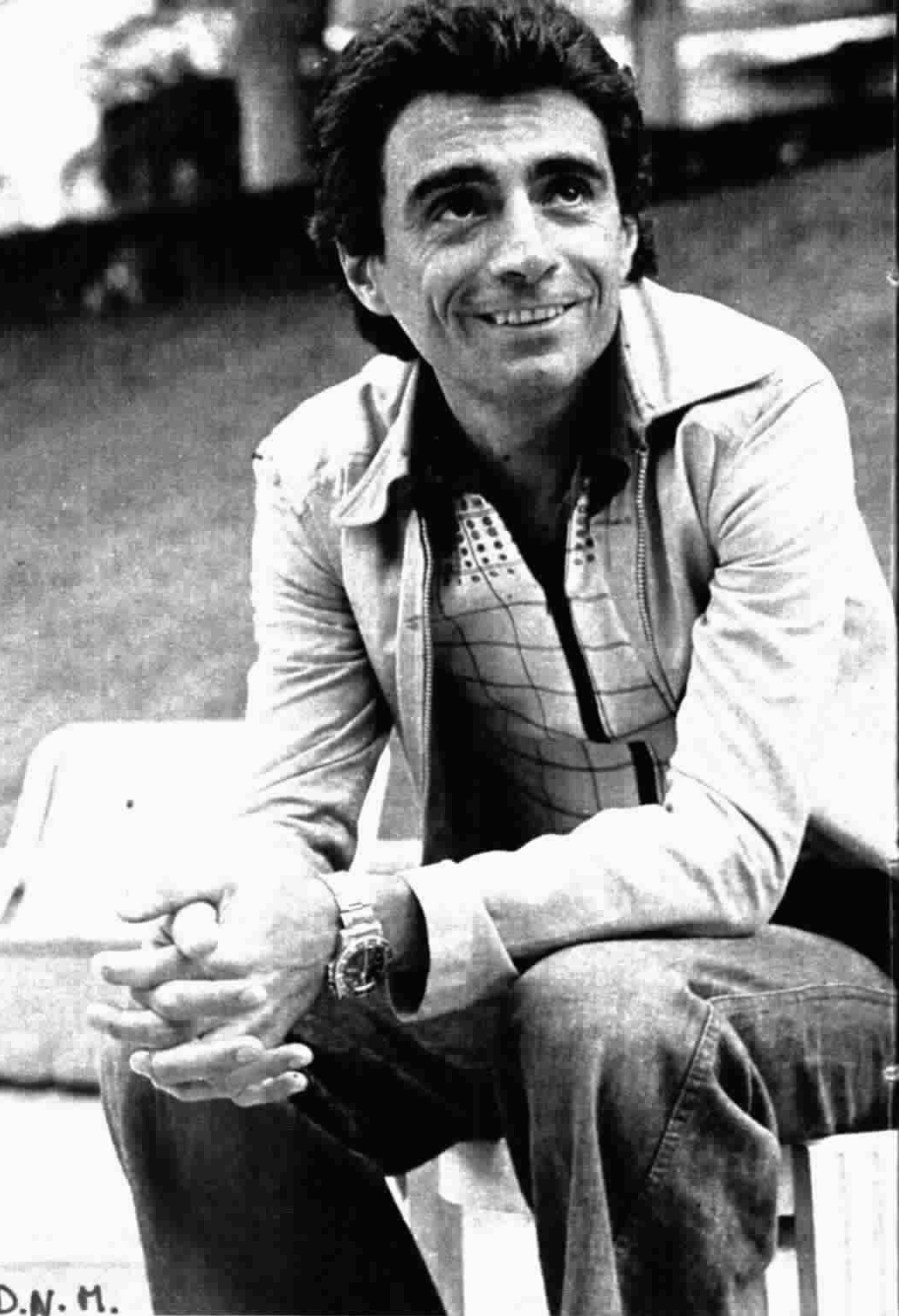 Italian singer Il Guardiano del Faro